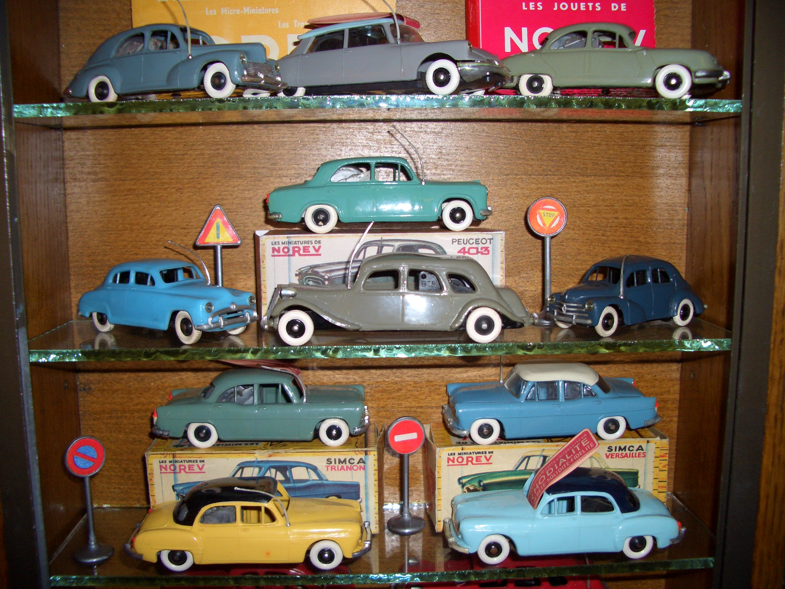 Ensemble de Norev 1955/57 "mécaniques" collection personnelle